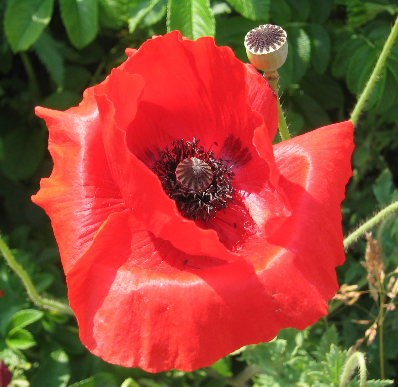 Mohnblüte. Fotografiert auf Sylt in Wennigstedt.